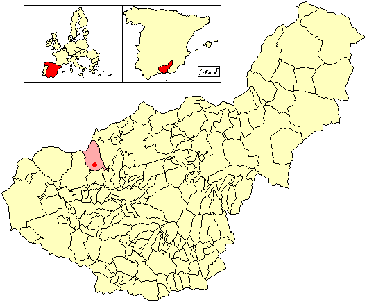 Situación de la localidad de Tiena (en el municipio de Moclín) respecto a la provincia de Granada, en España.